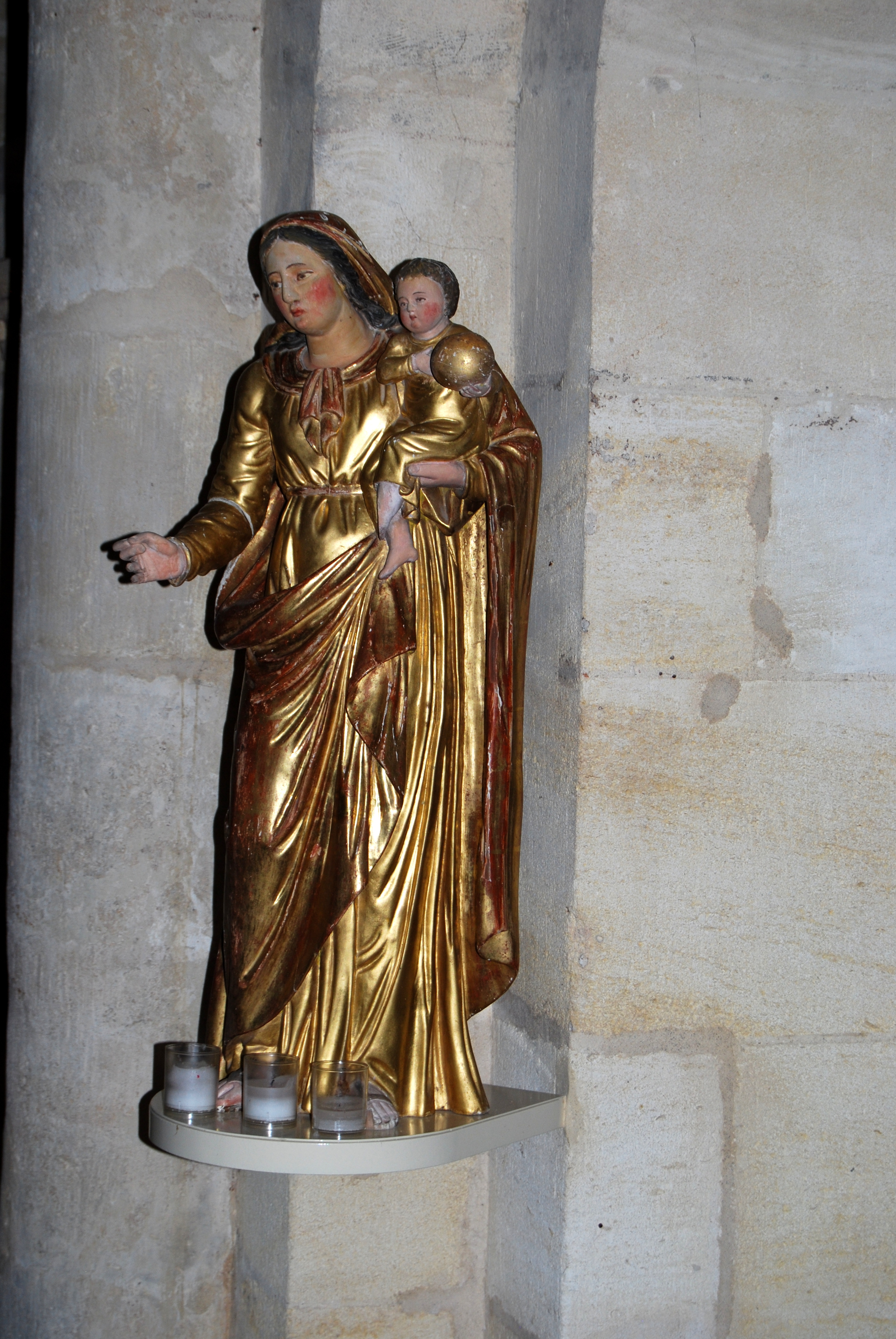 Lignan église Sainte-Eulalier